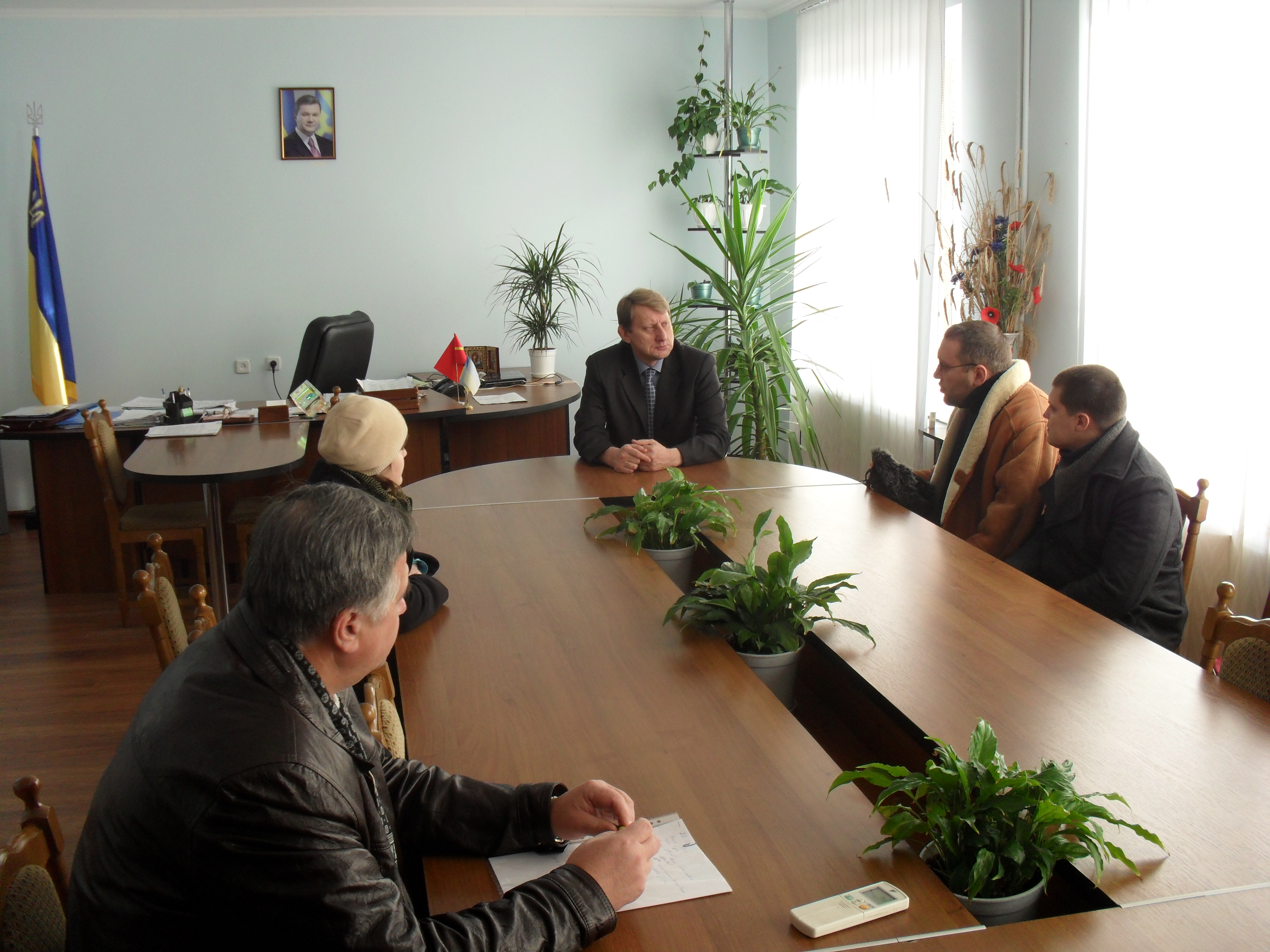 Зустріч вікіпедистів з головою Коростенської РДА